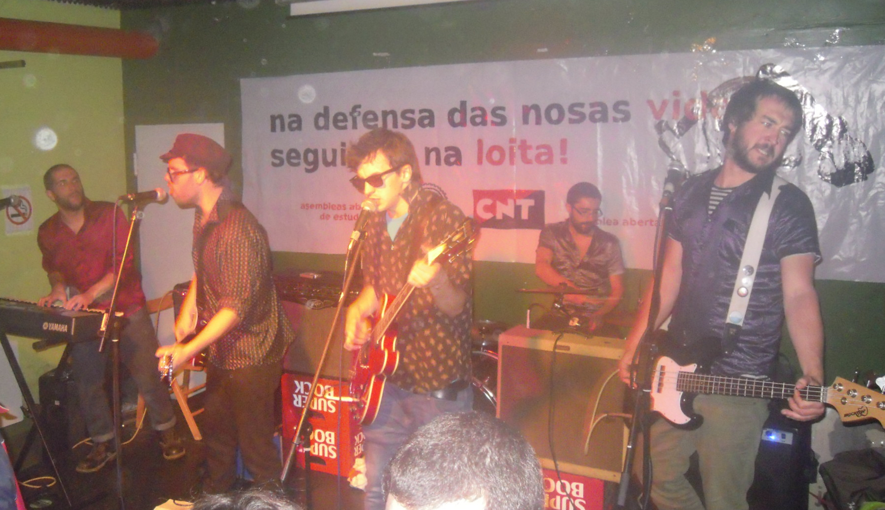 Concerto de Terbutalina, na Gentalha do Pichel (Santiago de Compostela), na celebración do Día Internacional dos Traballadores